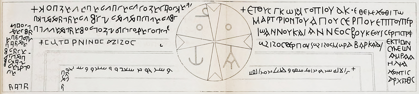 Inscription trilingue de Zabad (Sachau 1881 ap. p 190).